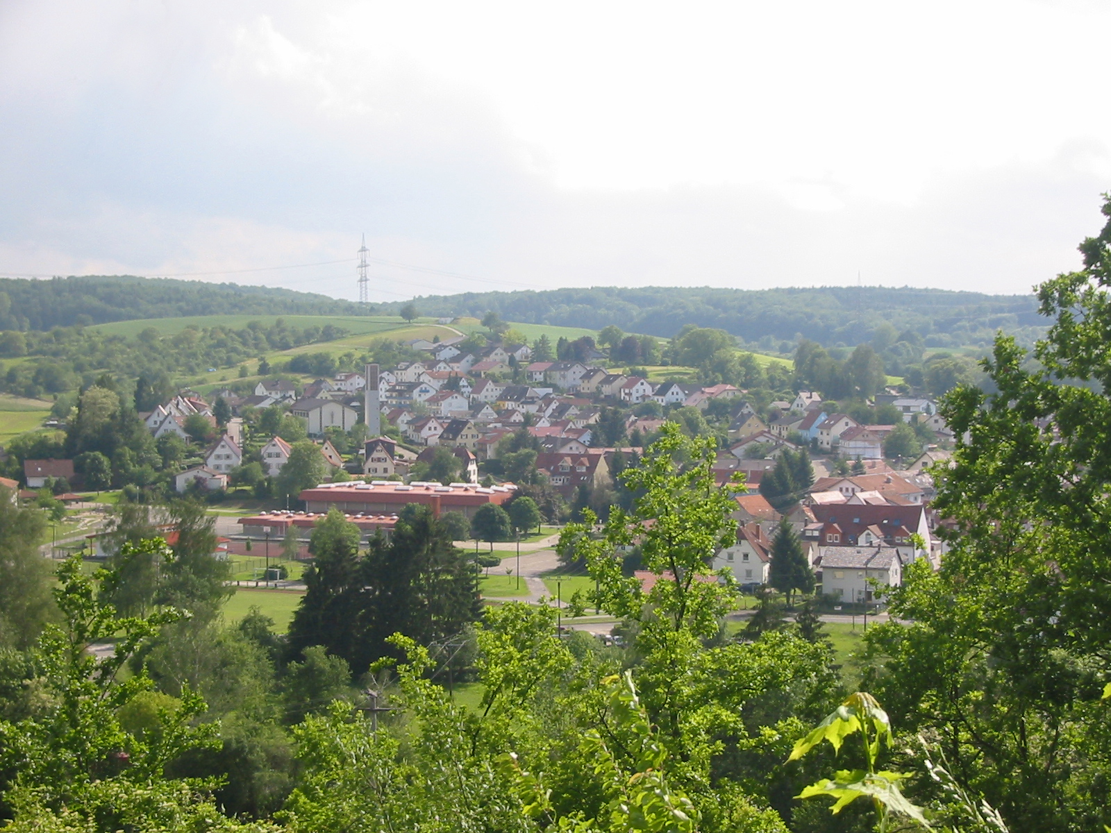 Eschelbronn